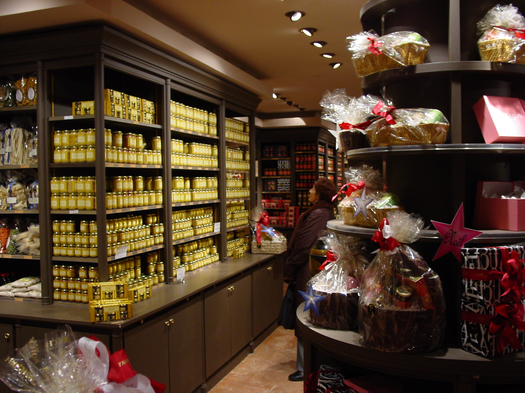 Fauchon - Talvez a melhor charcuterie do mundo